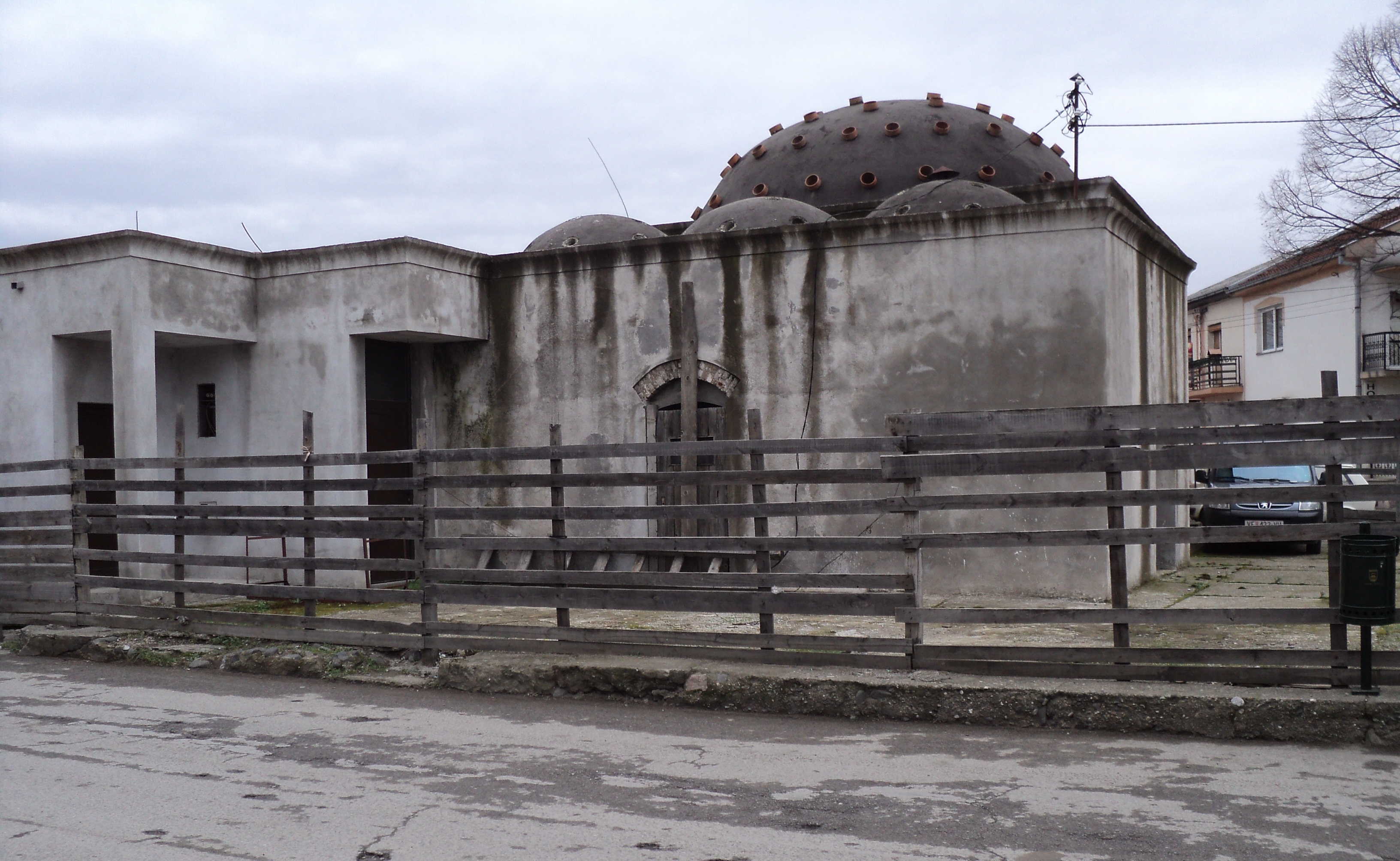 Стариот Турски Амам во близина на меѓуградската станица во Гевгелија.